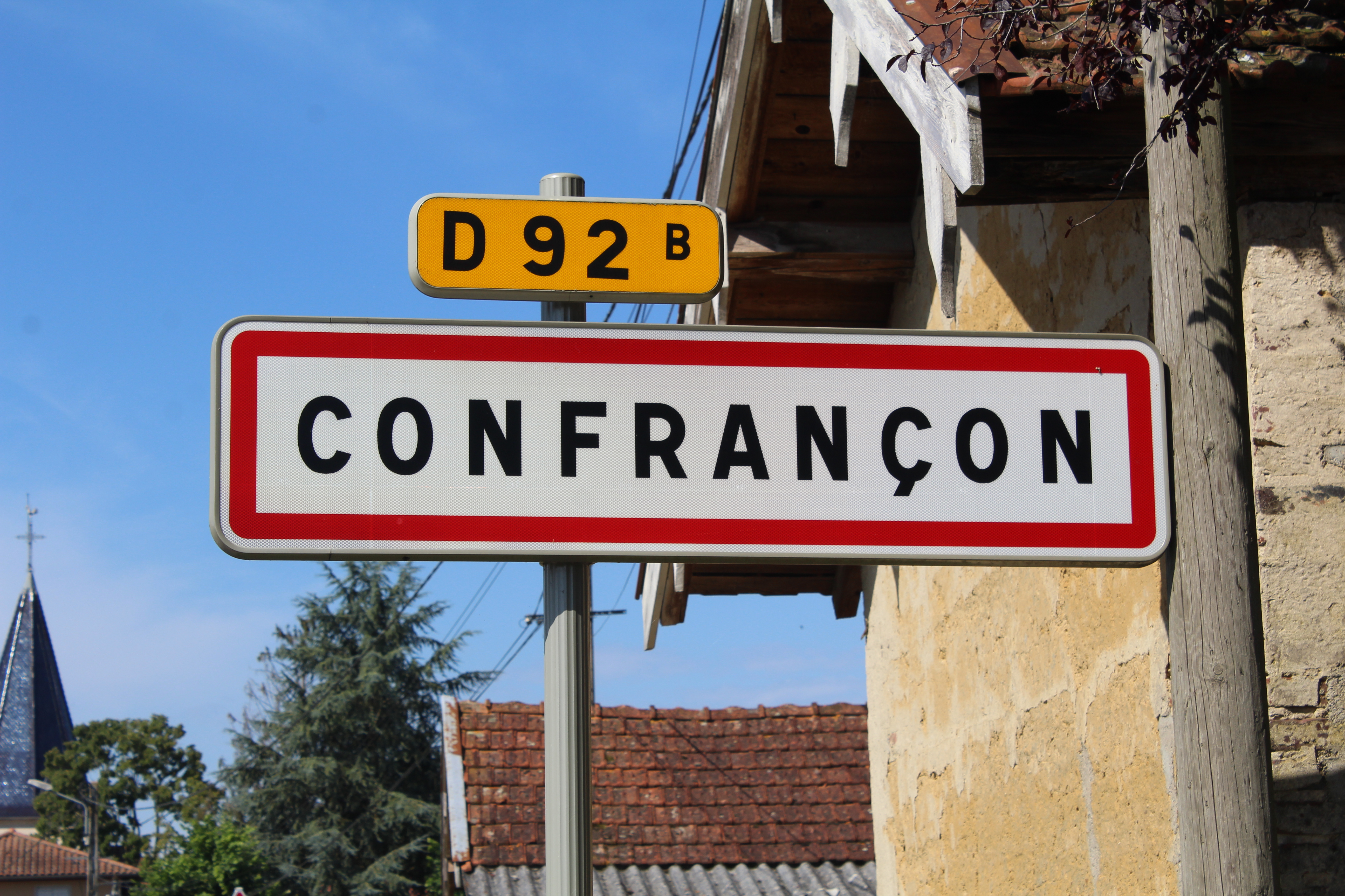 Panneau d'entrée dans Confrançon depuis Curtafond.